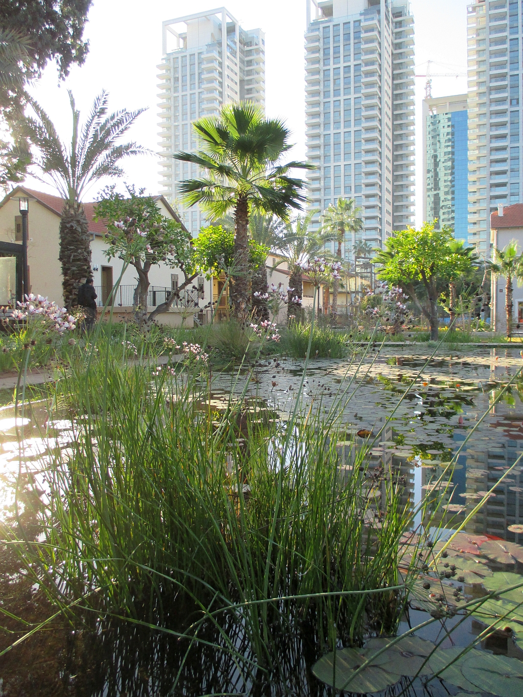 שׂרונה היא המושבה הרביעית שהקימו הגרמנים הטמפלרים בארץ ישראל במחצית השנייה של המאה ה-19. המושבה הוקמה ארבעה קילומטרים צפונית ליפו, ואחרוני בתיה שוכנים כיום בתל אביב בין שדרות שאול המלך מצפון, דרך בגין במזרח, רחוב הארבעה מדרום, ומגרשי החנייה של אחוזות החוף ממערב. מקצתם נמצאים היום בתוך בסיס הקריה.